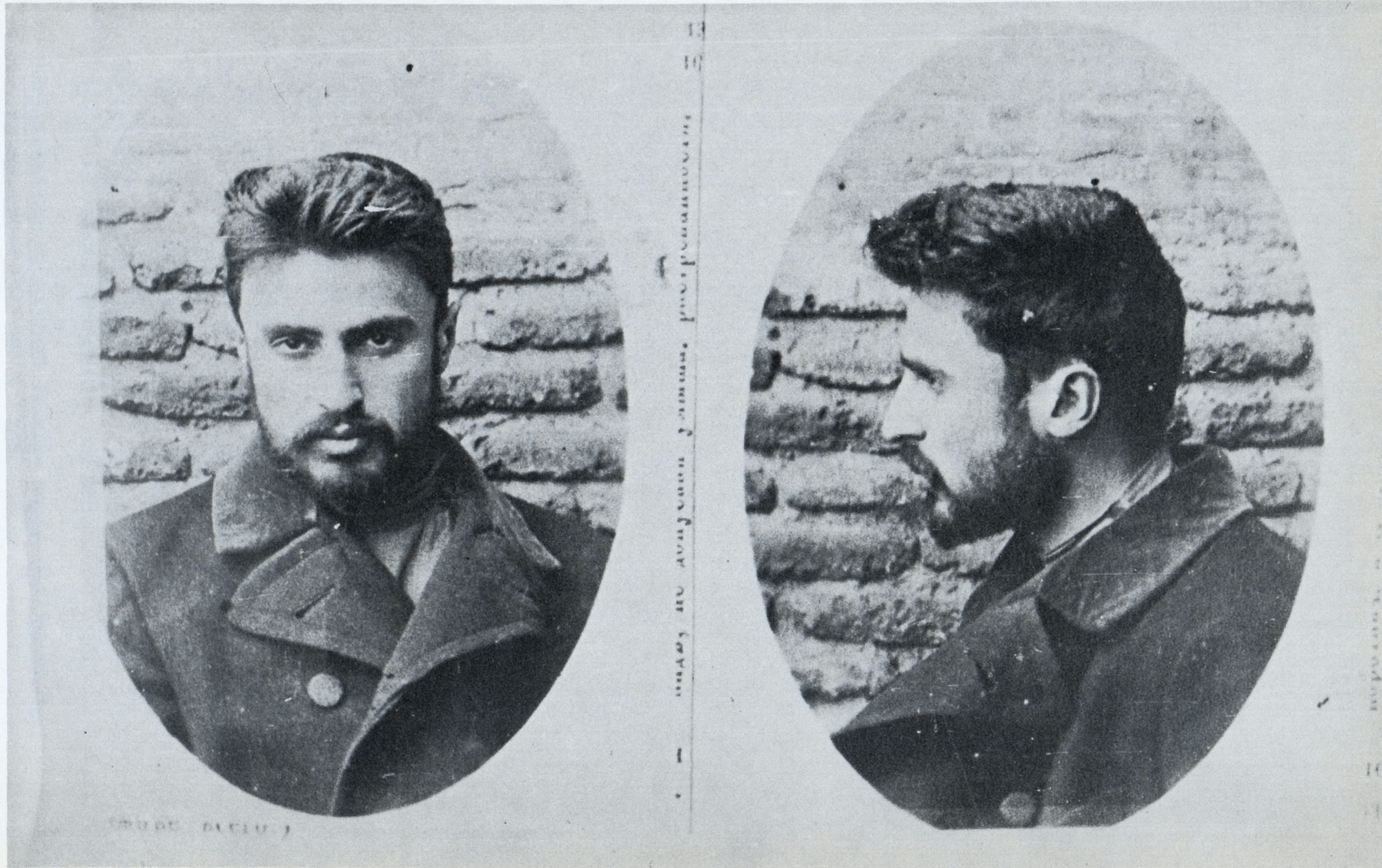 Irakli Tsereteli en las fotografías tomadas en la cárcel de Meteji en Tiflis en 1904